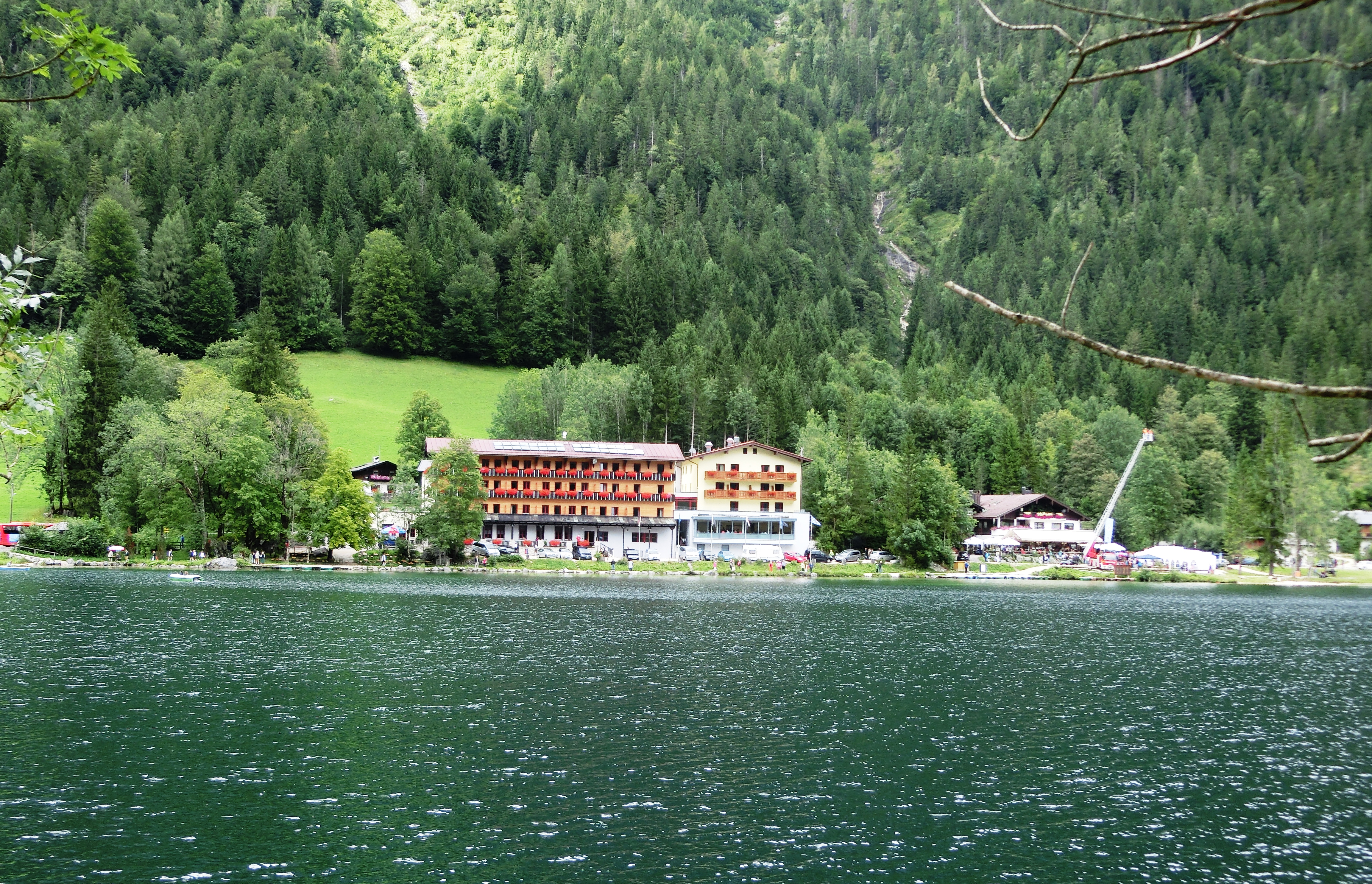 Impressionen während des Musikalischen Seefestes am Hintersee